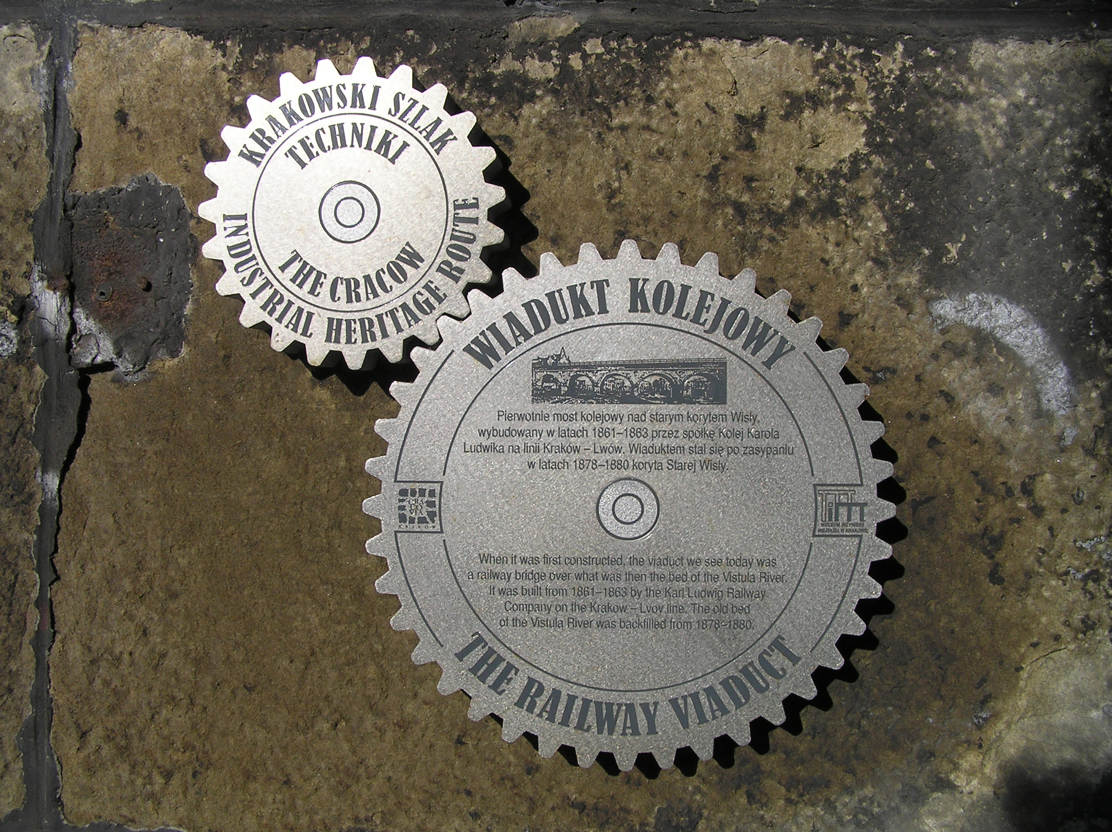 Krakowski Szlak Techniki – Wiadukt Kolejowy w Grzegórzkach – tablica informacyjna